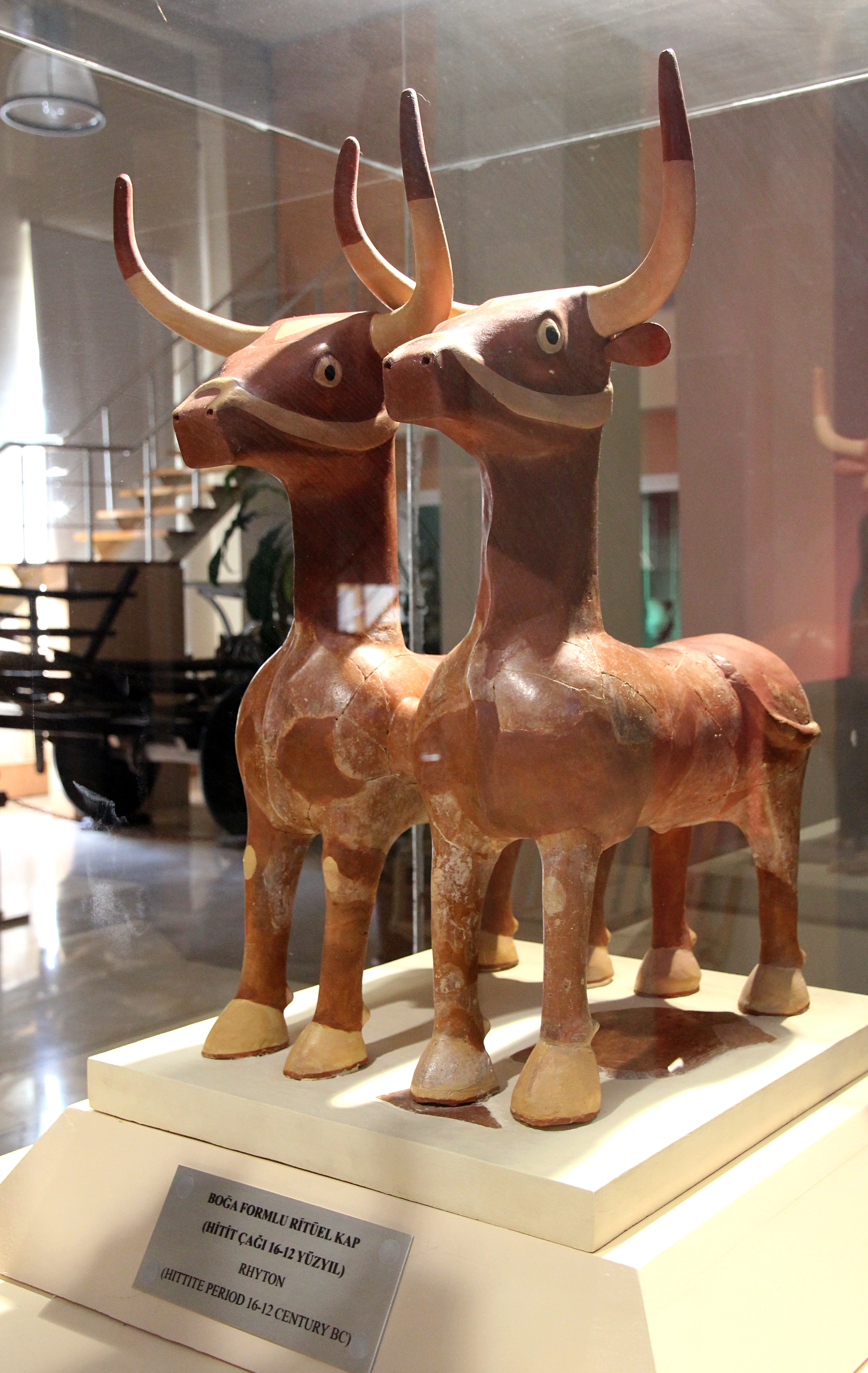 Archäologisches Museum Sivas, Zentraltürkei, hethitische Stierrhyta aus Başören bei Altınyayla